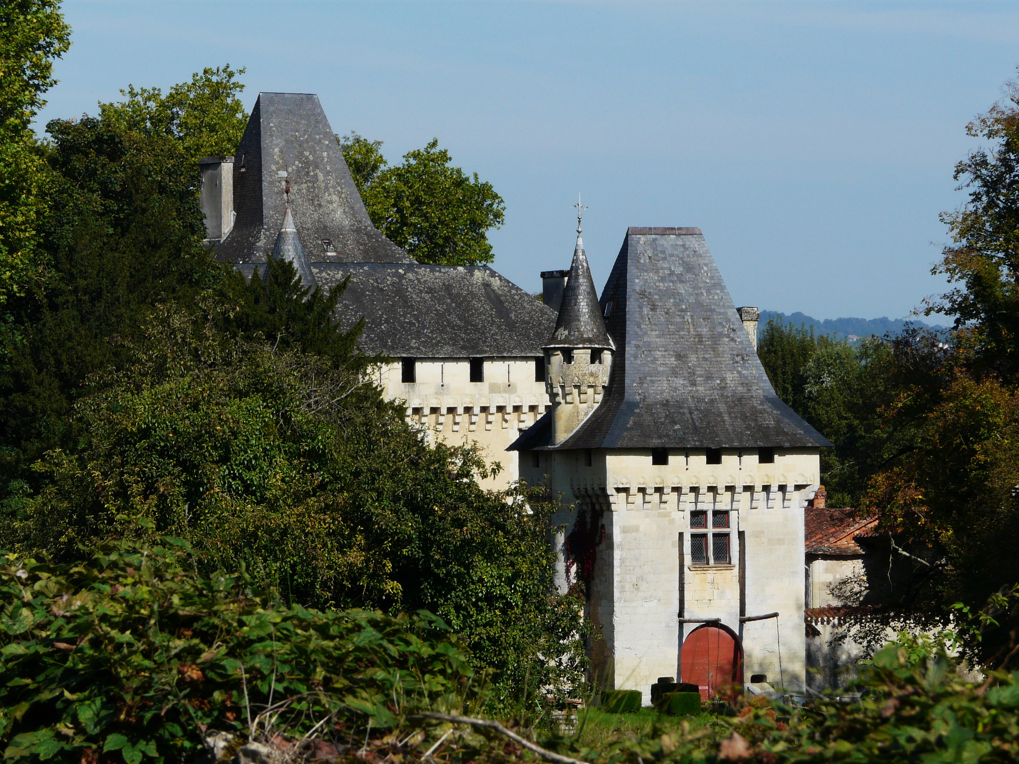 Le château du Lieu-Dieu, Boulazac, Dordogne, France